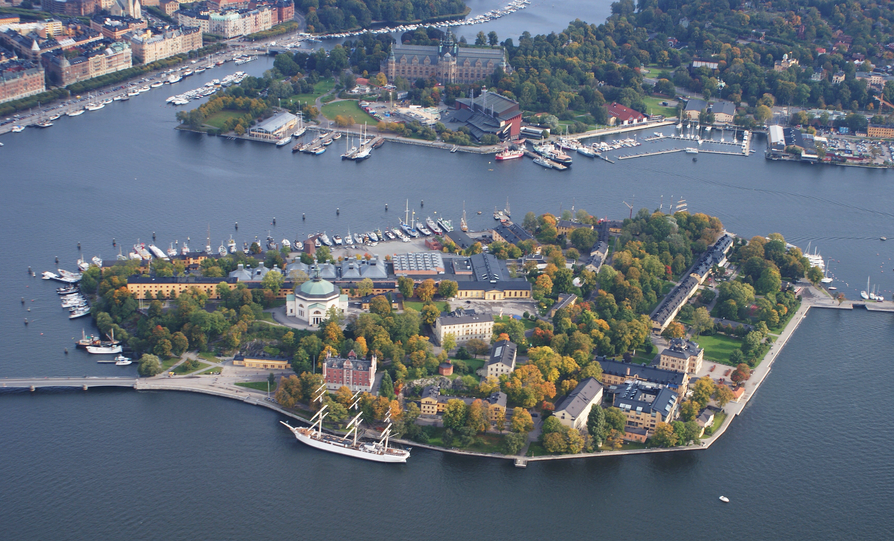 Skeppsholmen sedd från helikopter.